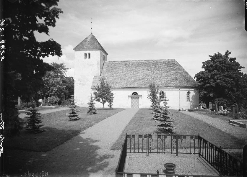 Kyrkan mot söder. Kategori: (01) ExteriörerKyrkan mot söder.